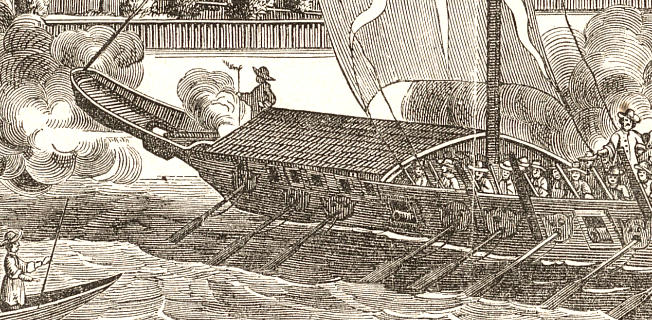 Neptun (1693) Kopie nach dem Neujahrsblatt der Constaffler und Feuerwerker im Zeughaus von Johannes Meyer aus dem Jahr 1694, detaillerte Beschreibung siehe Scan vom Buch